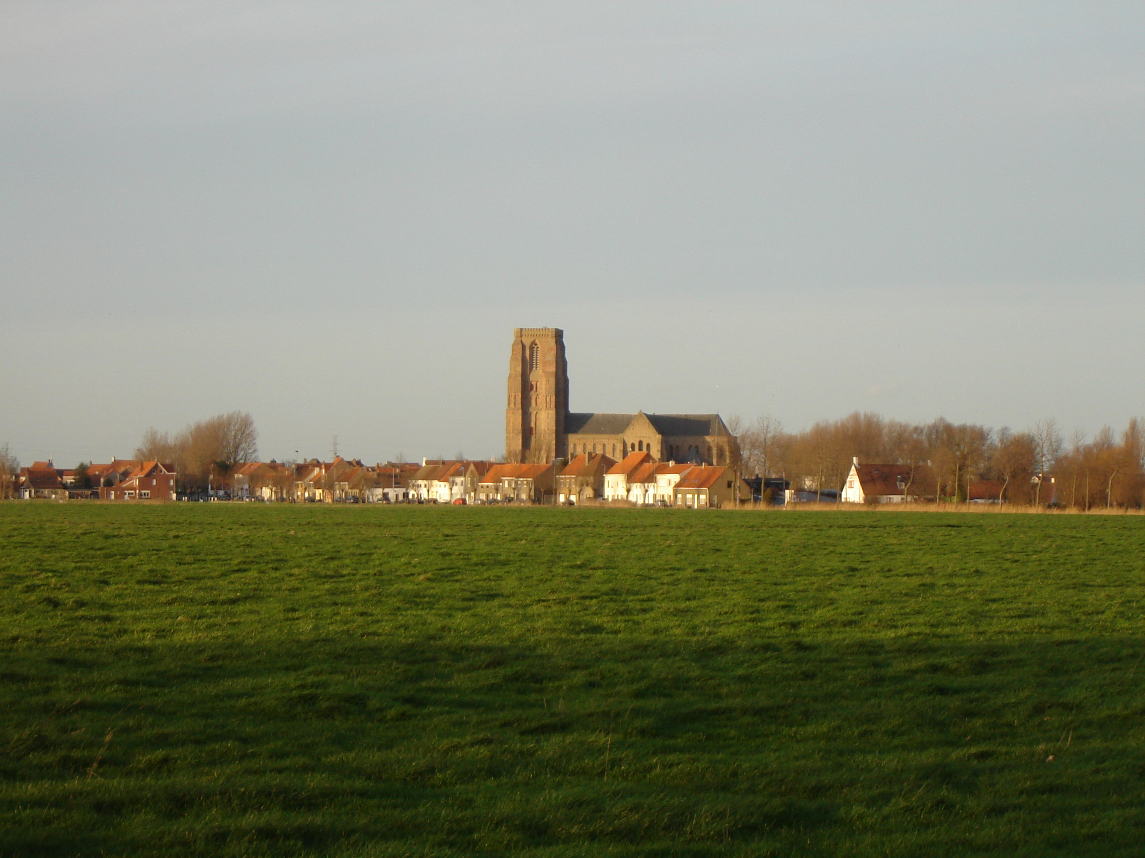 Village of Lissewege in Bruges, West-Flanders, Belgium. As seen Ter Doest.